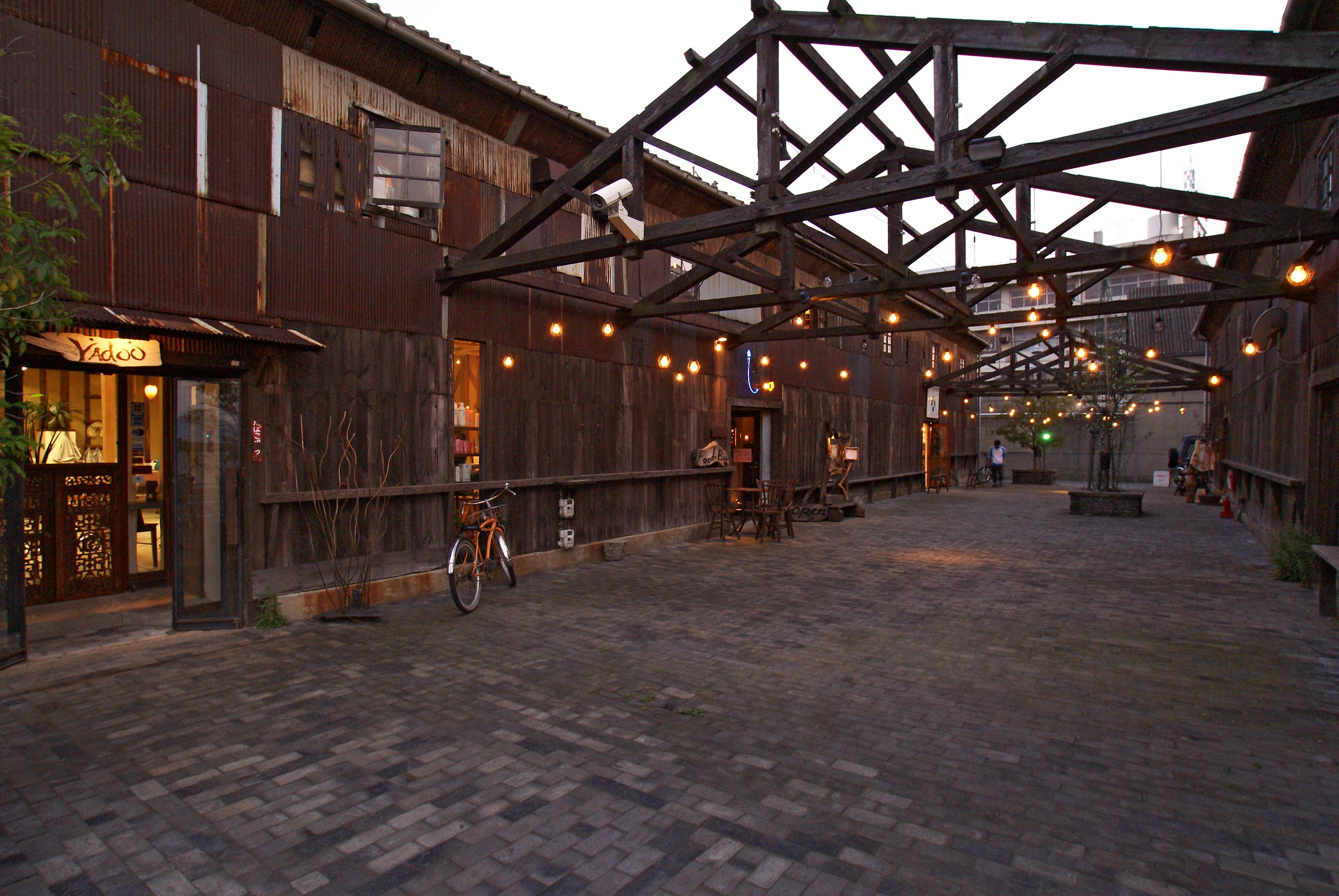 Kitahama-alley in Takamatsu, Kagawa prefecture, Japan